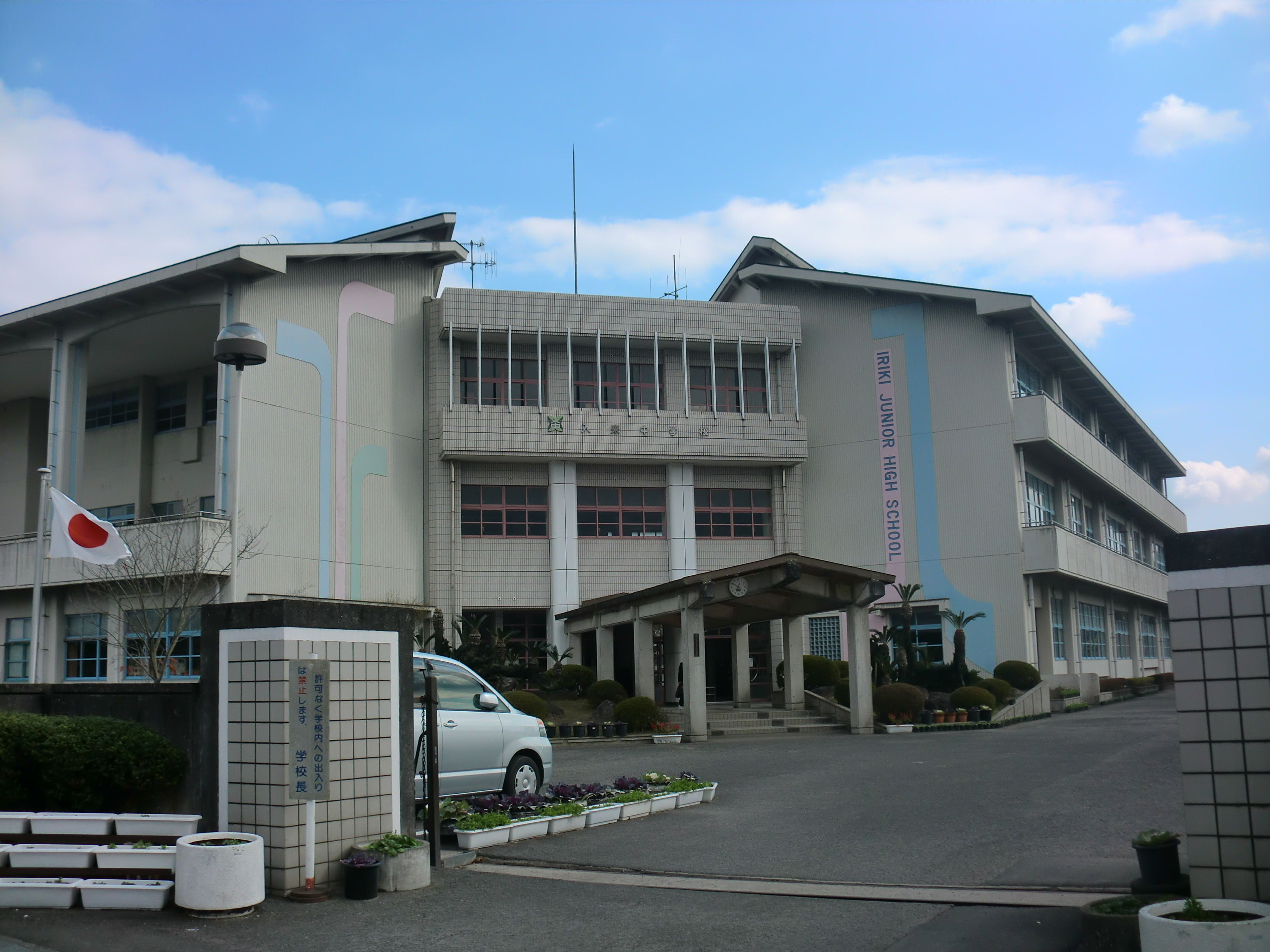 薩摩川内市にある薩摩川内市立入来（いりき）中学校